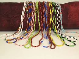 Se trata de una ceremonia de suma importancia pues simboliza la entrada real a la Regla de Osha. En esta ceremonia, el aleyo recibe 5 elekes, que representan 5 de los Orishas más importantes del sistema religioso.